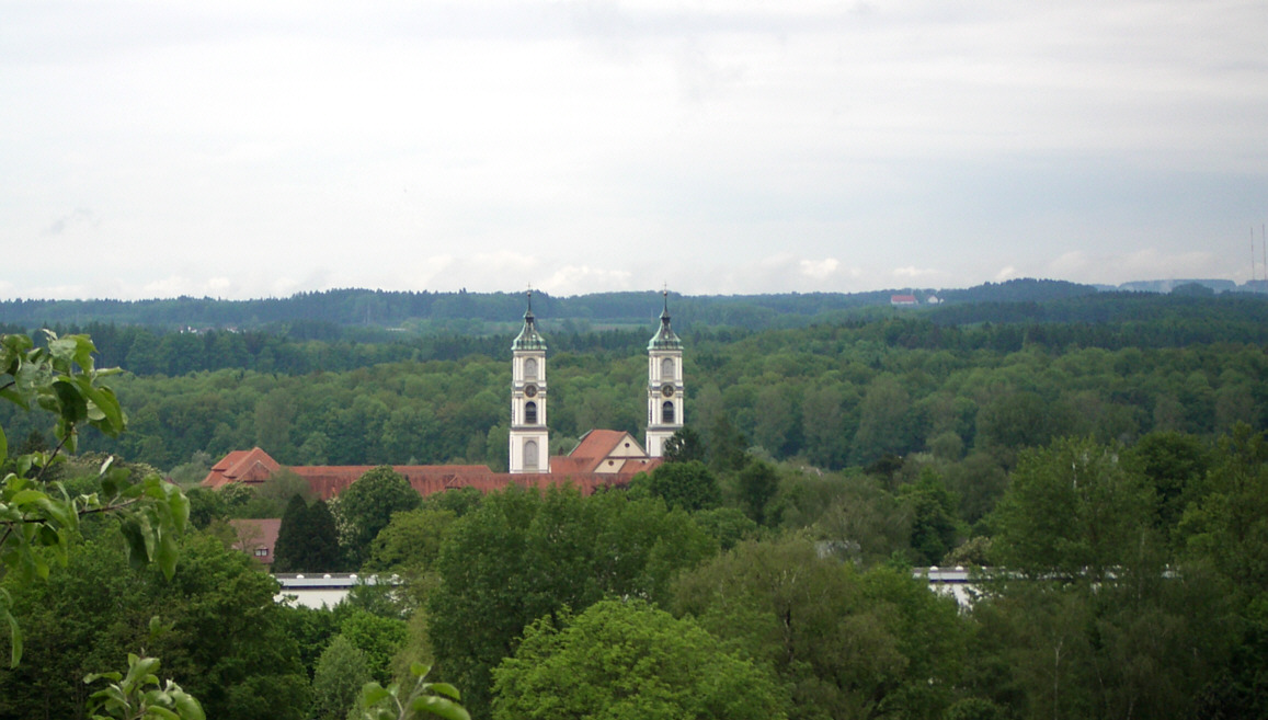 Ravensburg, Germany: Kloster Weißenau from East